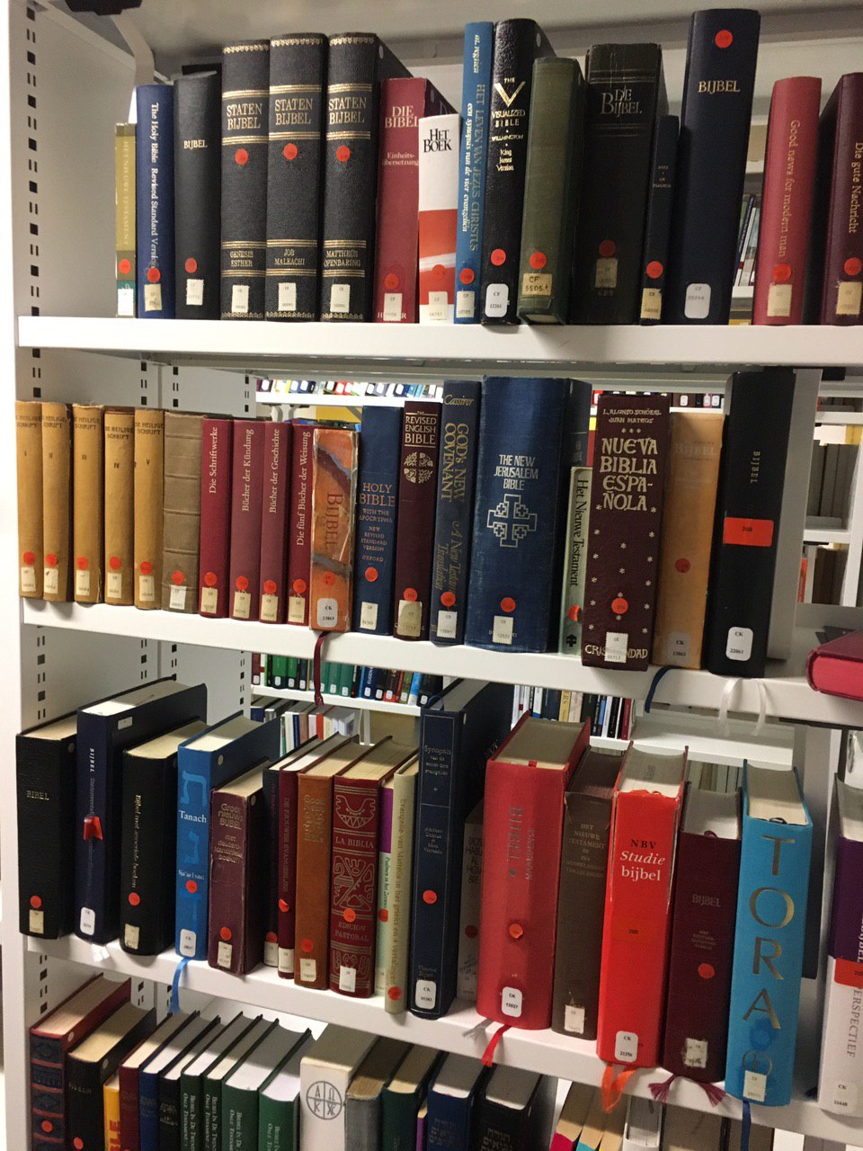 Enkele (voornamelijk Nederlandse) Bijbelvertalingen in de bibliotheek in het Hoofdgebouw van de Vrije Universiteit van Amsterdam